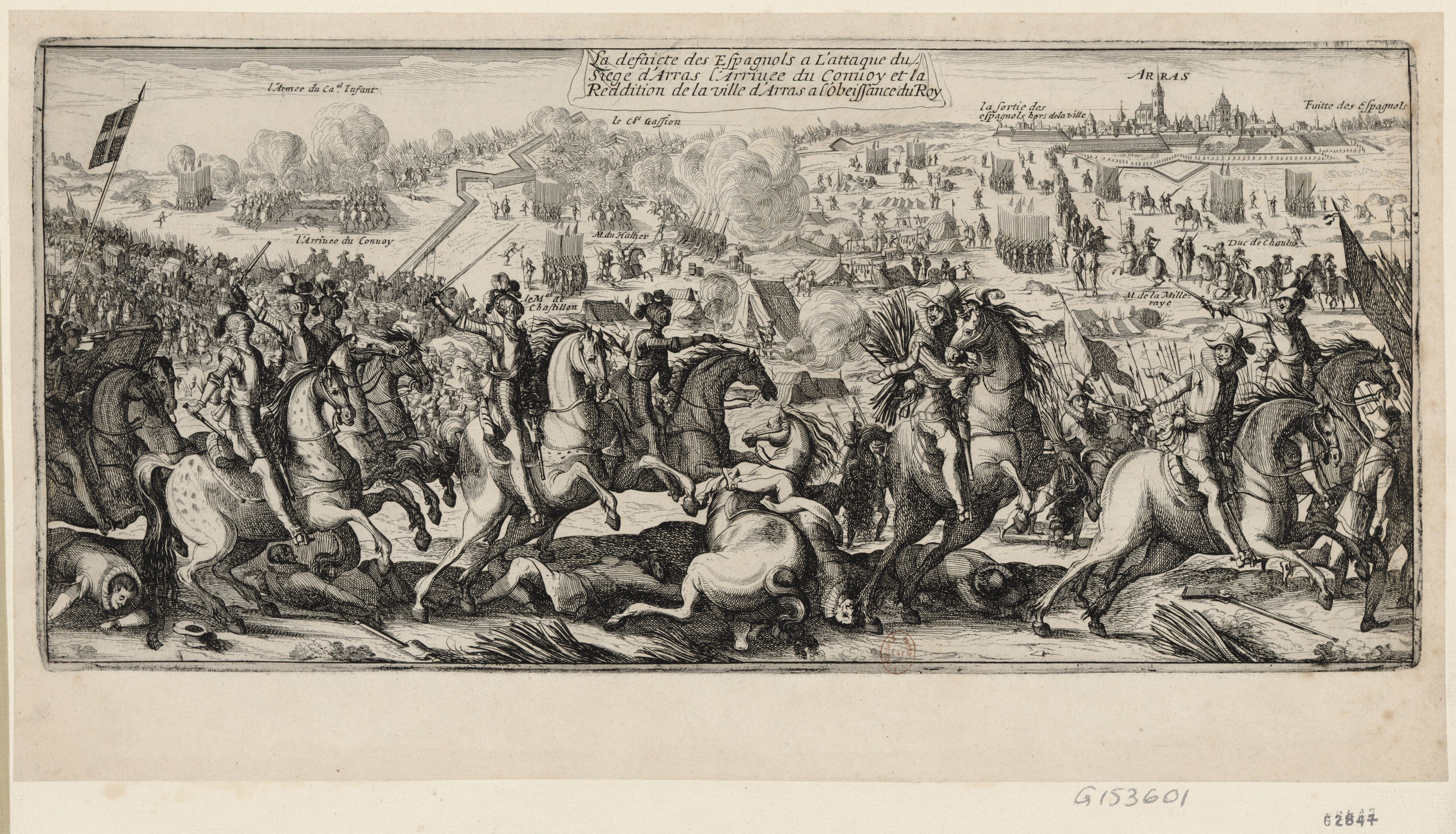 "La defaicte des Espagnols à l'attaque du siége d'Arras. L'Arrivée du Convoy et la Reddition de la ville d'Arras a l'obeissance du Roy". Estampe